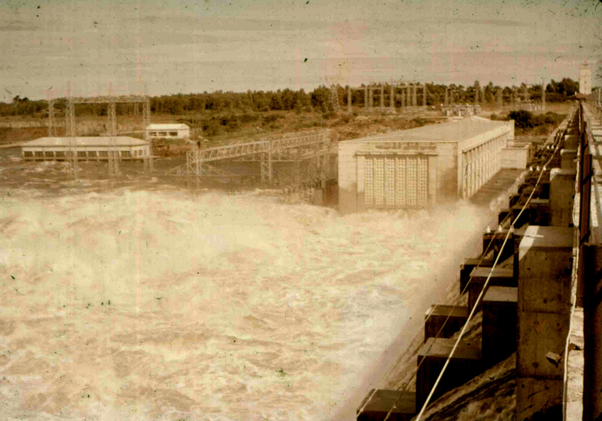 Rincón del Bonete Creciente de 1959 Vista Margen Derecha